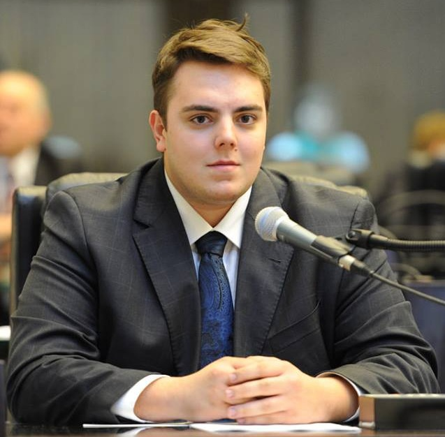 Deputado Felipe Francischini